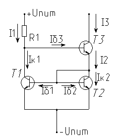 Токовое зеркало Уилсона